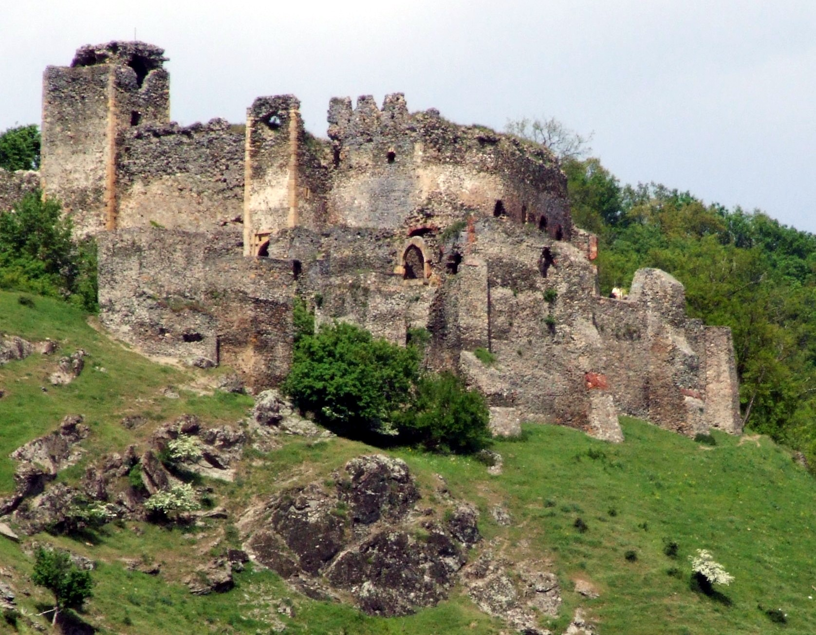 Cetatea Șoimoș se află pe malul drept al Mureșului, vizavi de Lipova și deasupra satului cu același nume, pe un deal înalt de 252 metri. A fost construită după primele invazii ale tătarilor în zonă și este atestată documentar din anul 1278.